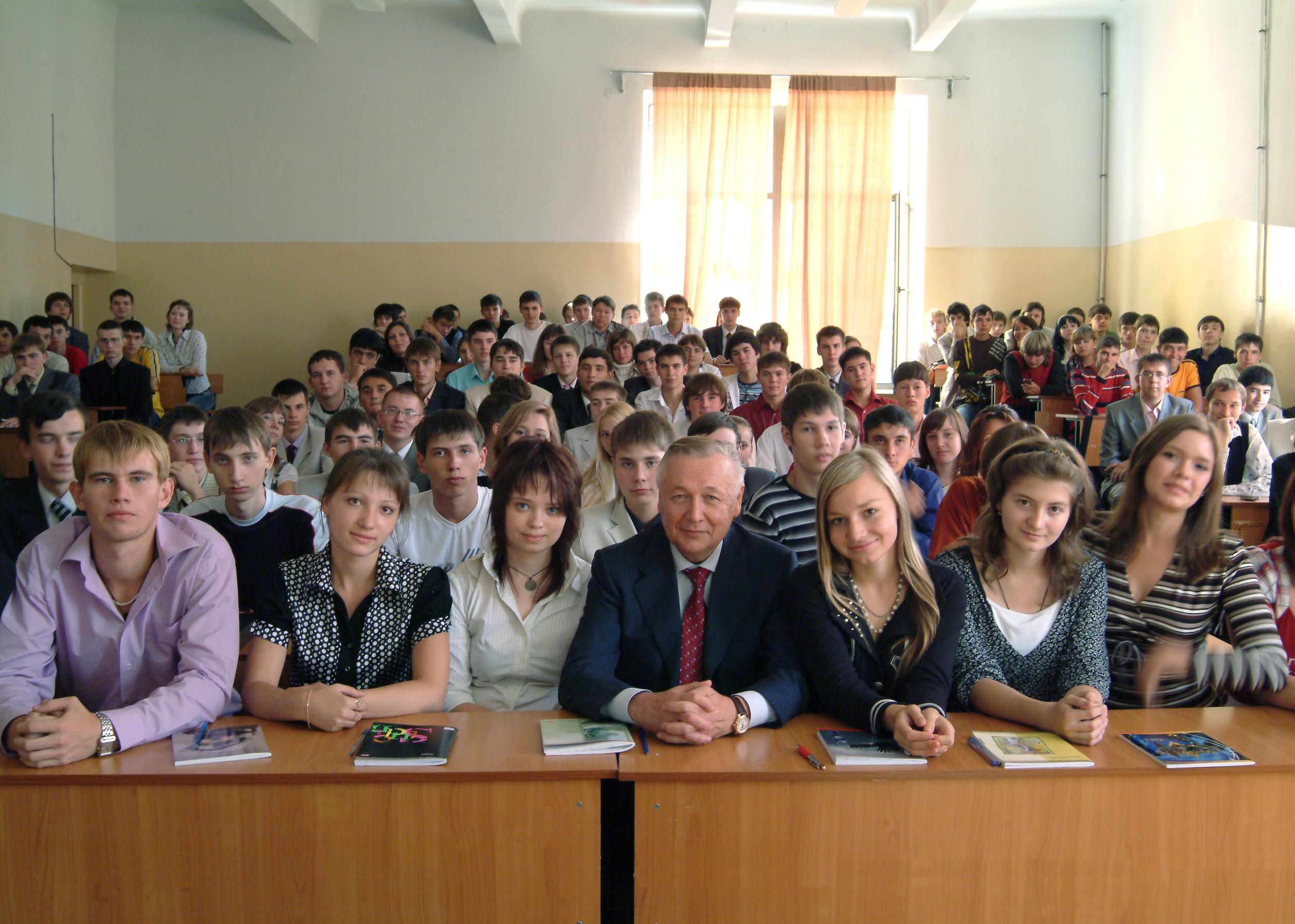 Ректор УГНТУ профессор А. М. Шаммазов в аудитории со студентами